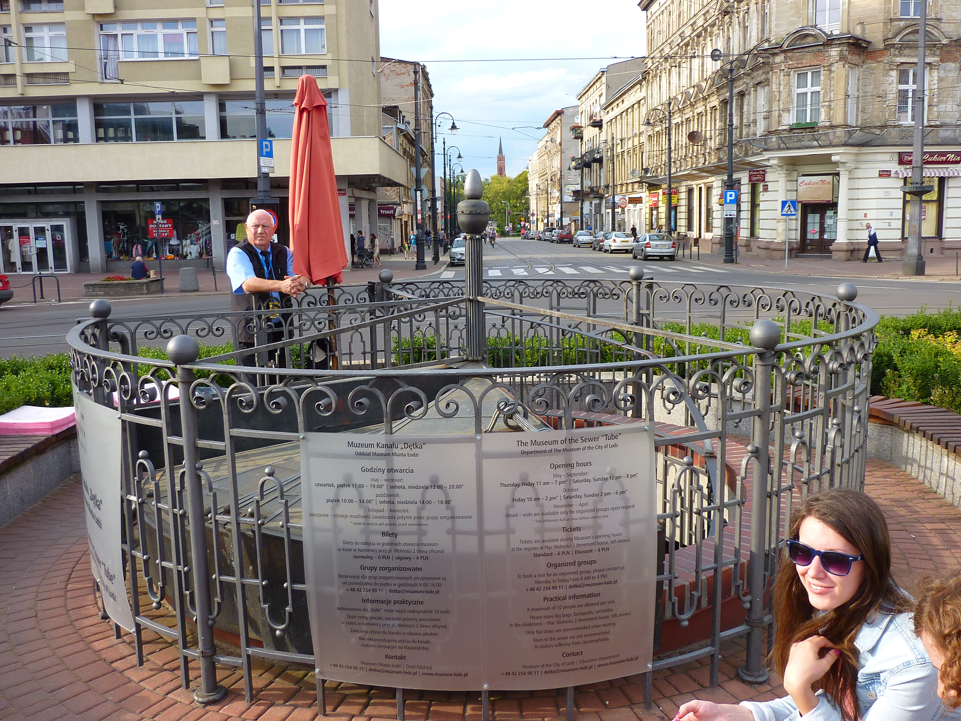 Wejście do Muzeum Kanału "Dętka". W tle ul. Nowomiejska - widoczna również wieża kościoła p.w. Wniebowzięcia NMP.